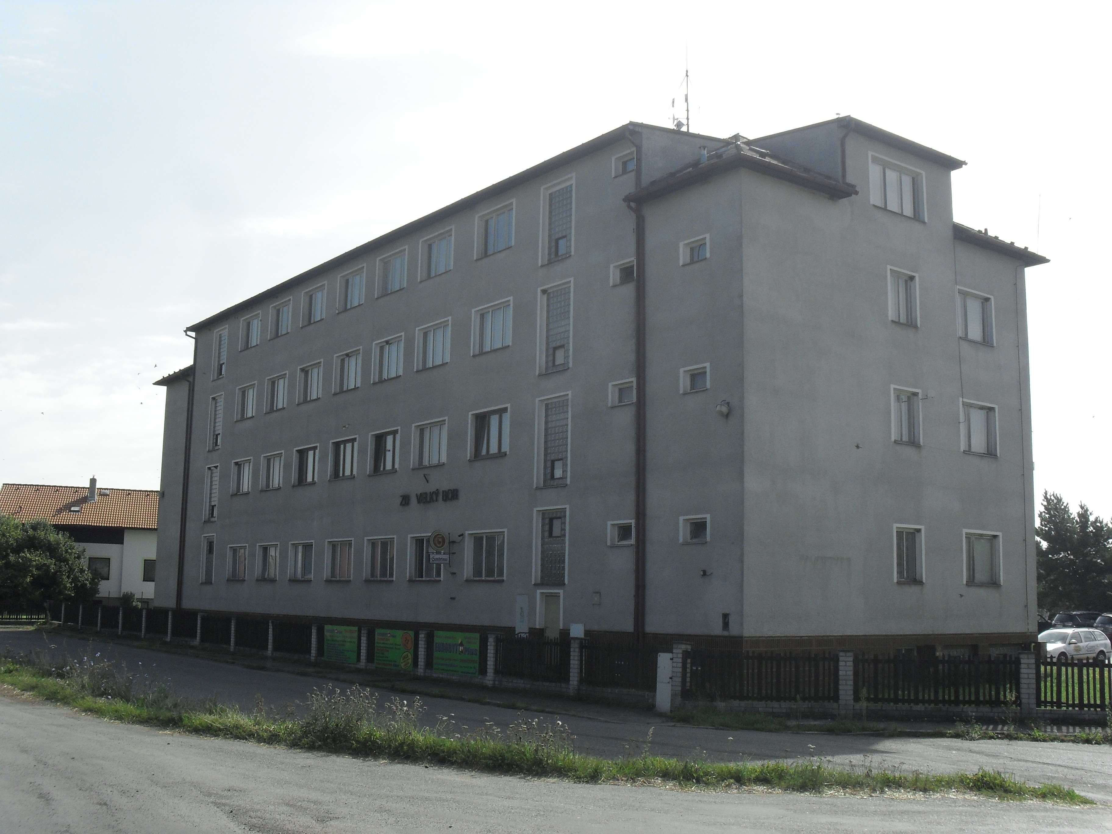 Fotografie pořízena v obci Velký Bor.